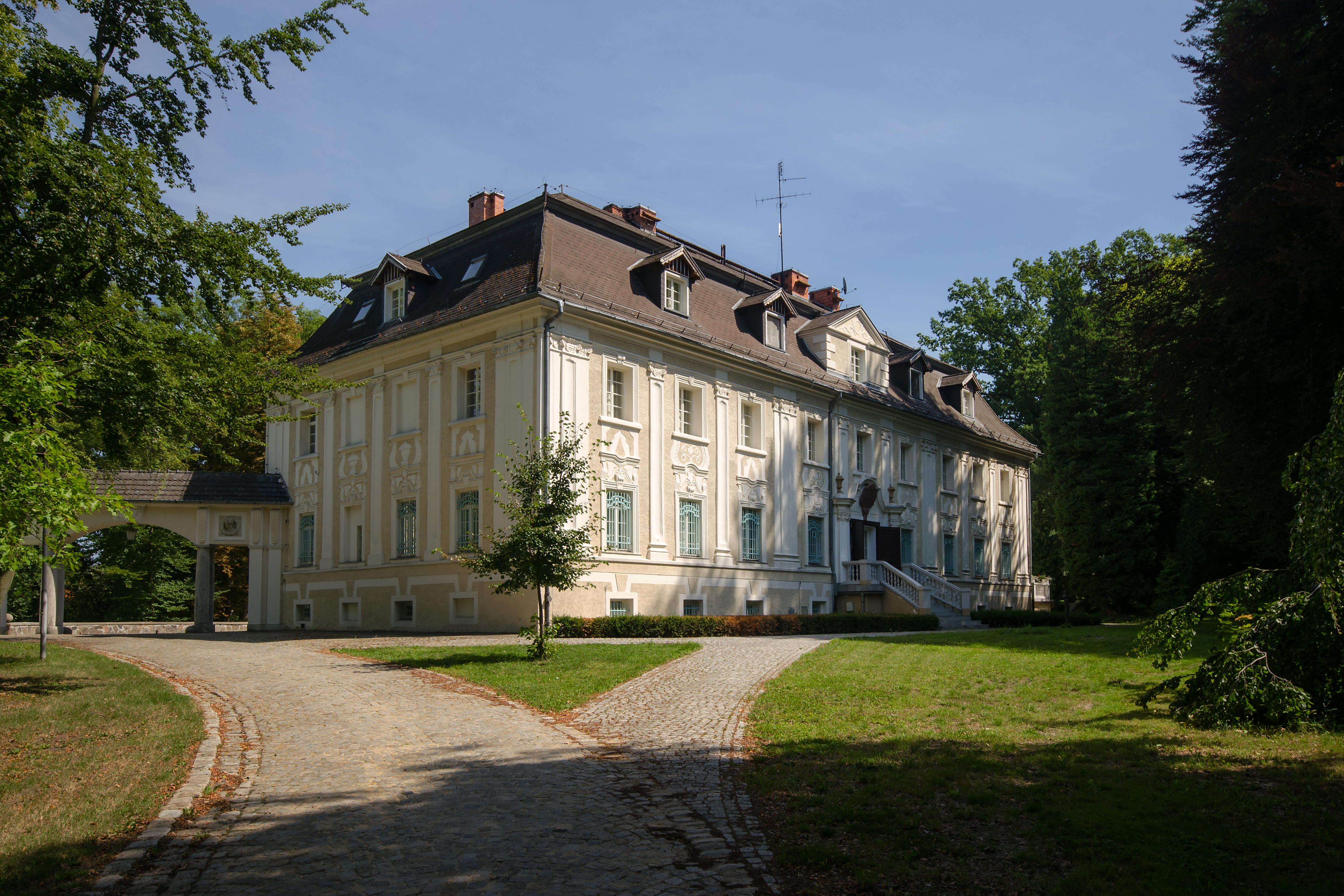 Bagno, pałac, ob. klasztor salwatorianów, pocz. XVIII, XX